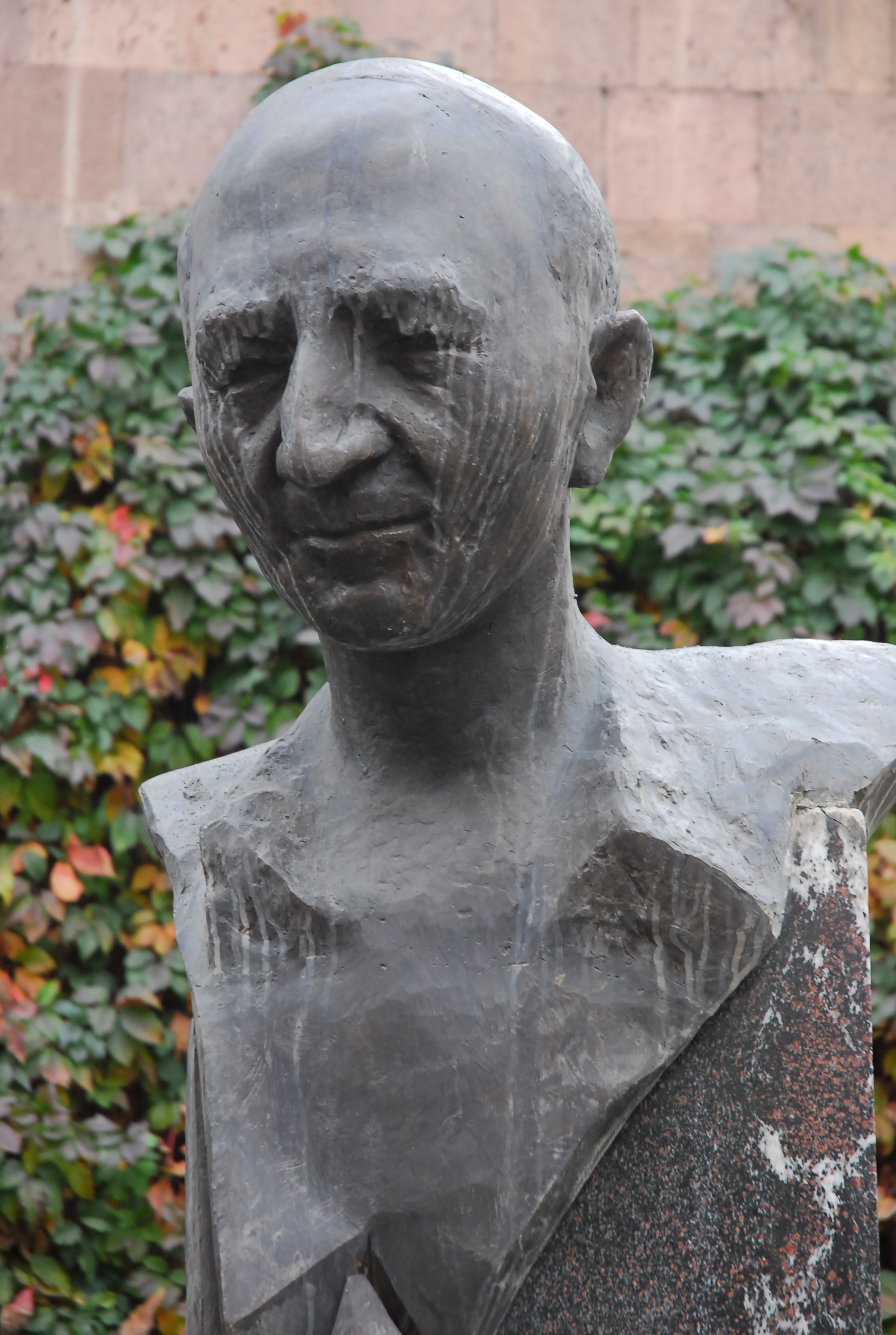 Խաչիկ Դաշտենց, կիսանդրի, 2003 թ., Հայաստան, Երևան, թիվ 114 միջն. դպրոց, քանդակագործ` Համլետ Մատինյան